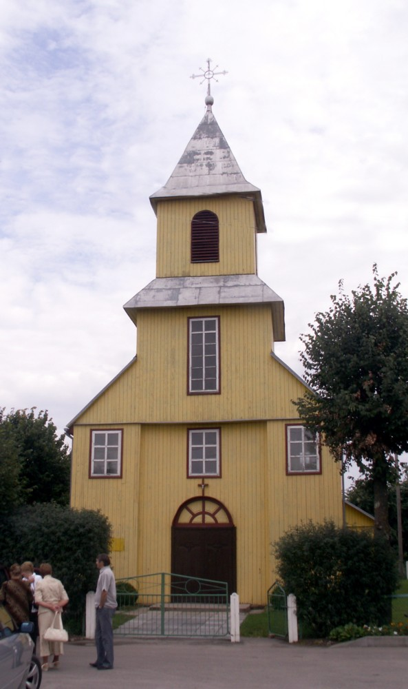 Kužių Švč. Mergelės Marijos Gimimo bažnyčia